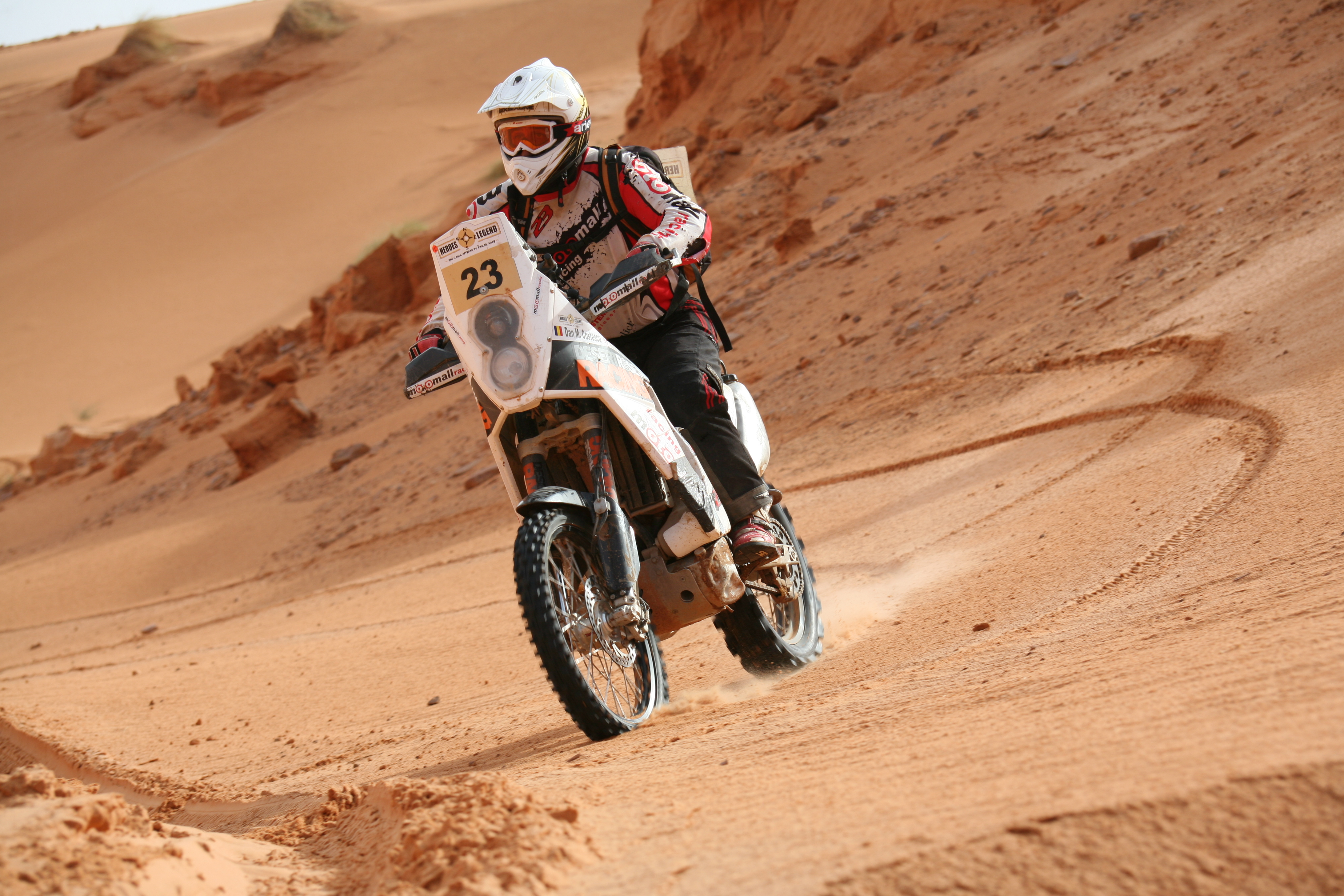 Pasul Tifouja, unul din simbolurile raliului Dakar